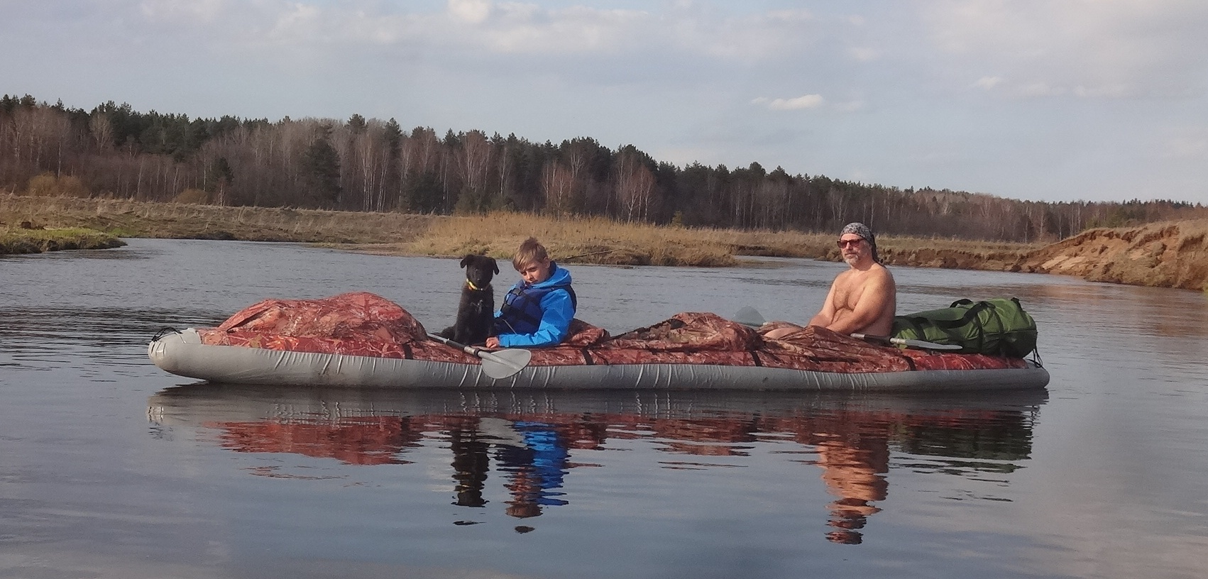 Надувная байдарка Щука-3 производителя КБ Сталкер (г.Москва) с двумя пассажирами и собакой (среднее место не занято), р.Осуга (Тверская обл.)